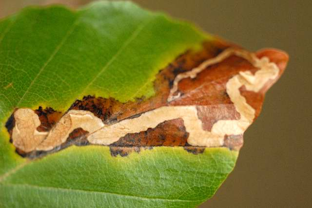 Stigmella hemargyrella from Commanster, Belgian High Ardennes .